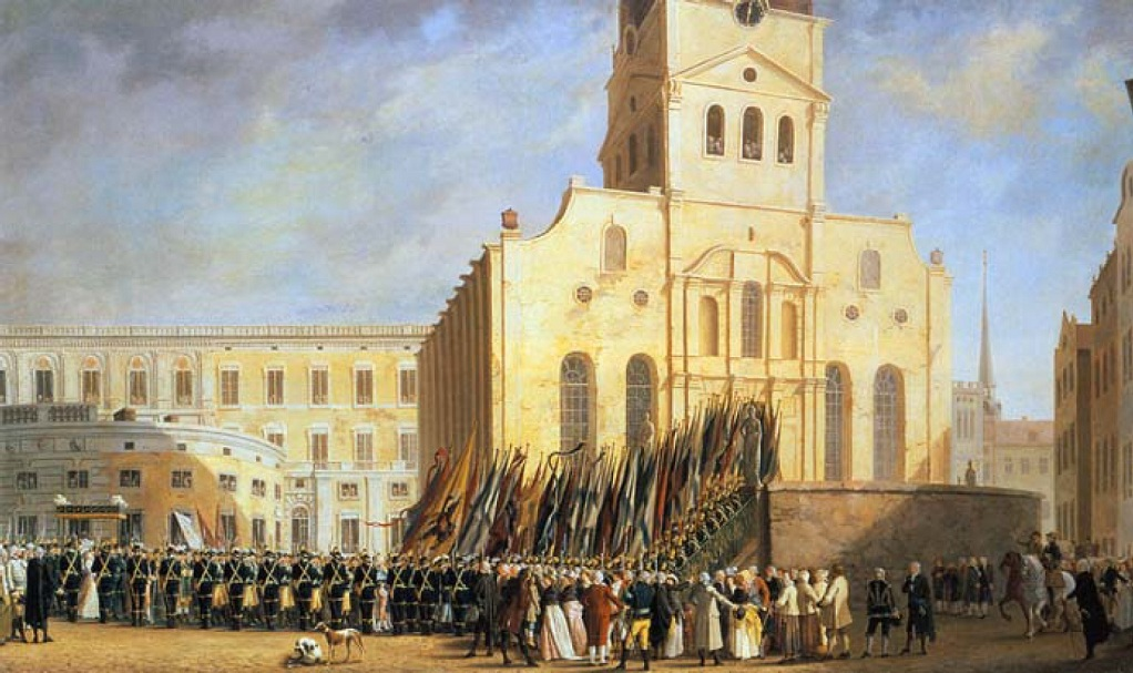 Troféer från slaget vid Svenskskund bäres in i Storkyrkan 1790